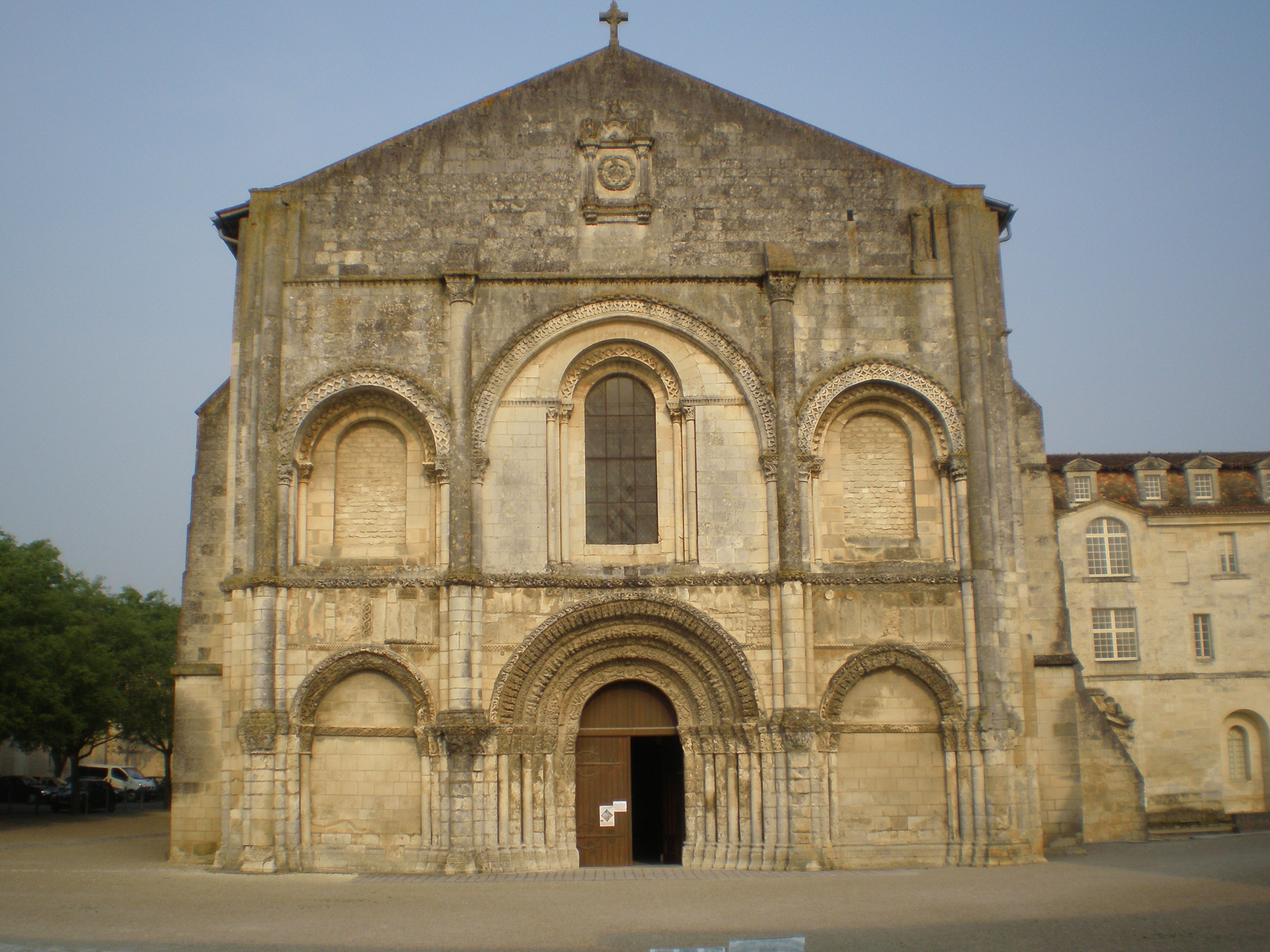 Façade de l'église Notre-Dame de l'Abbaye-aux-Dames de Saintes